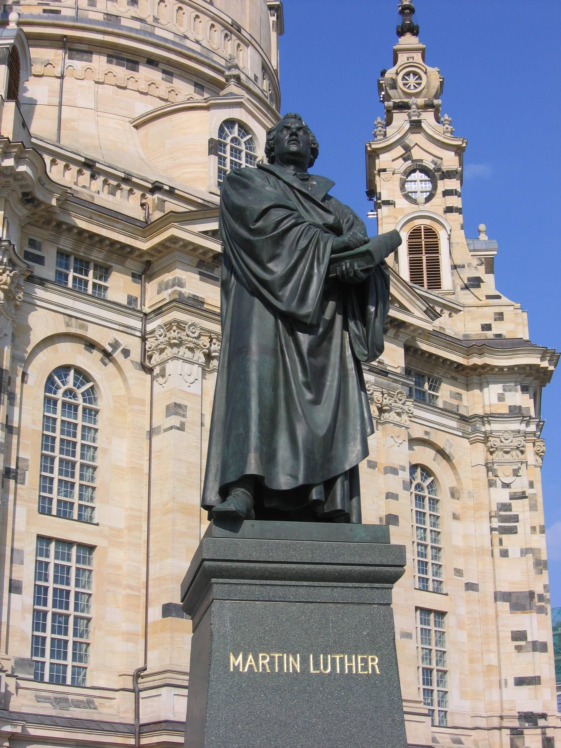 Dresden, Martin-Luther-Statue von Ernst Rietschel vor der Frauenkirche